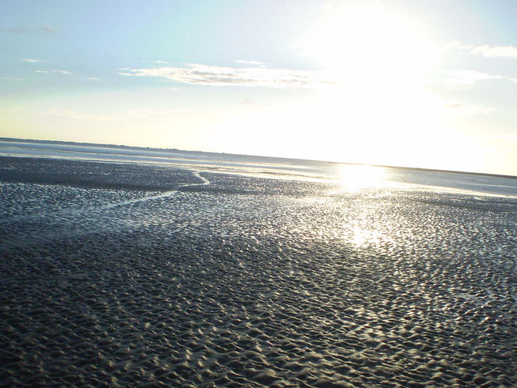 Punta Raza, San Clemente del Tuyu, Argentina